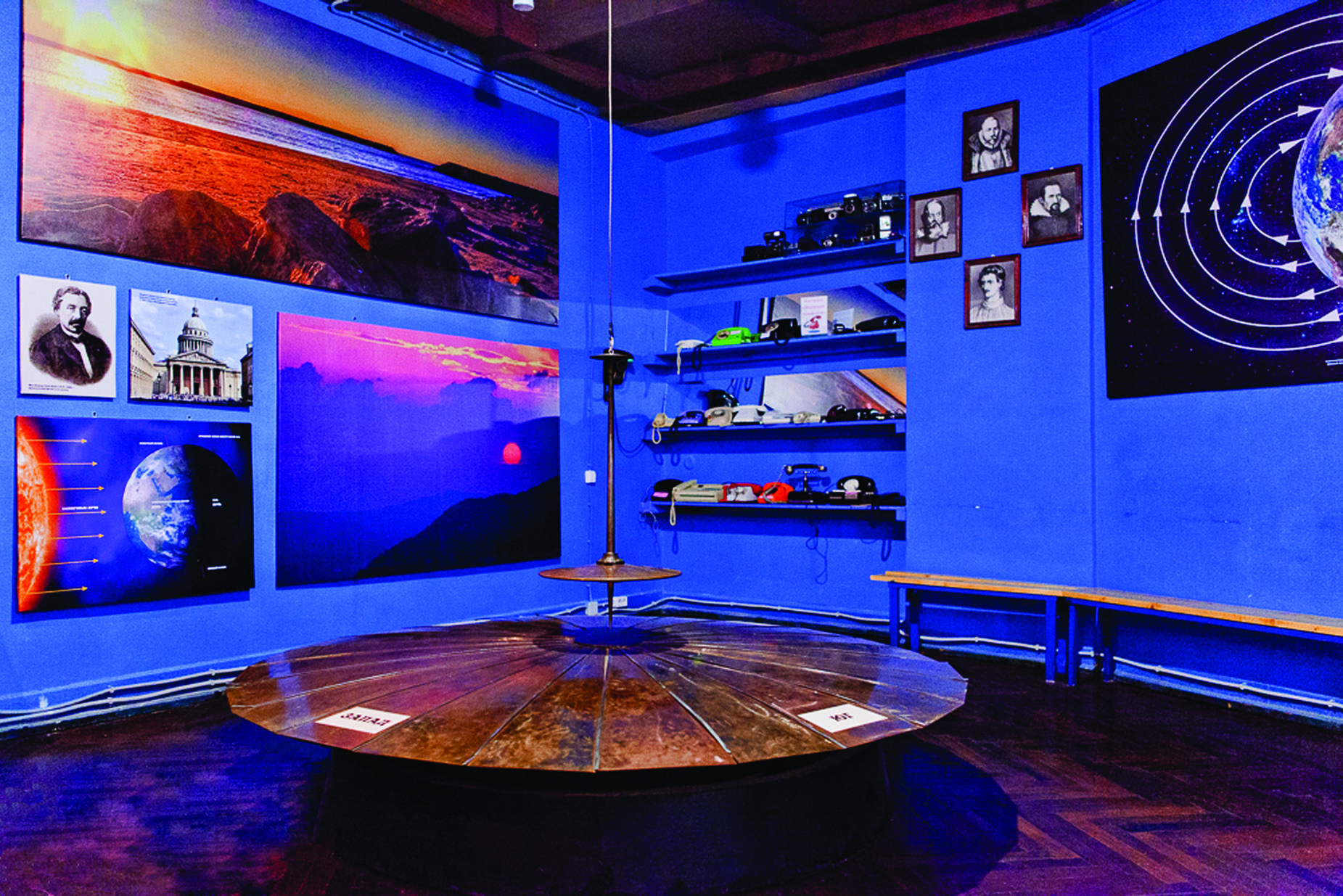 Маятник Фуко Петербургского Планетария